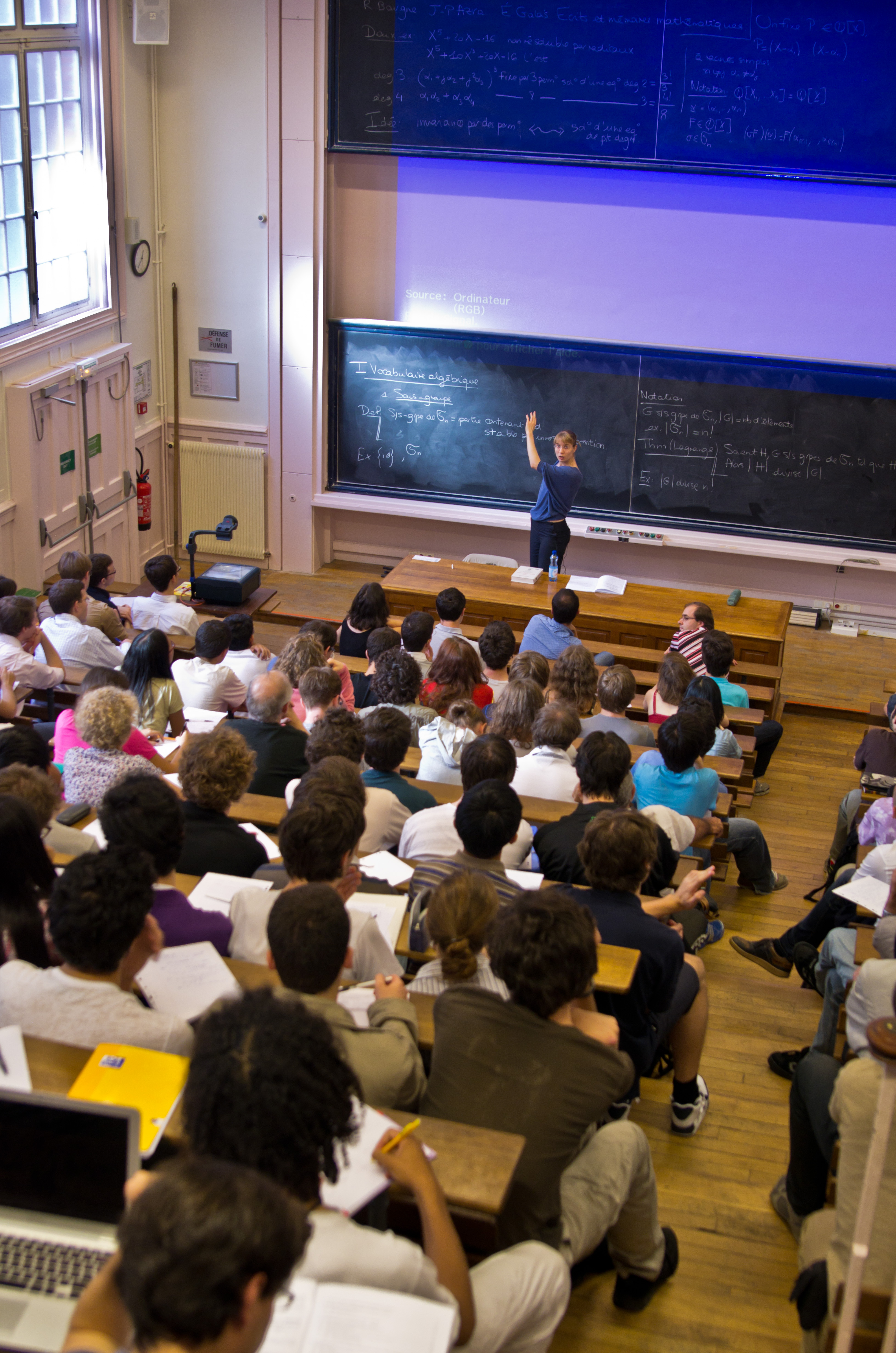 amphithéâtre Hermite à l'Institut Henri-Poincaré pendant un séminaire Mathematic Park